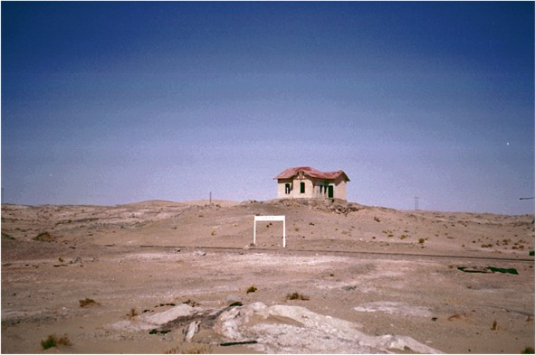 Grasplatz, eine Bahnstation rund 50 Kilometer östlich von Lüderitz, Namibia.